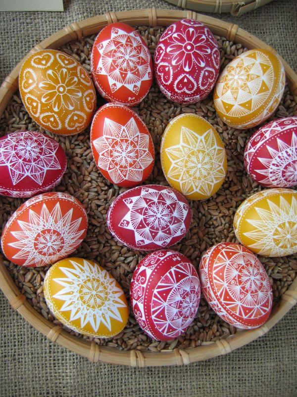 Mesterségek Ünnepe Hímes tojások